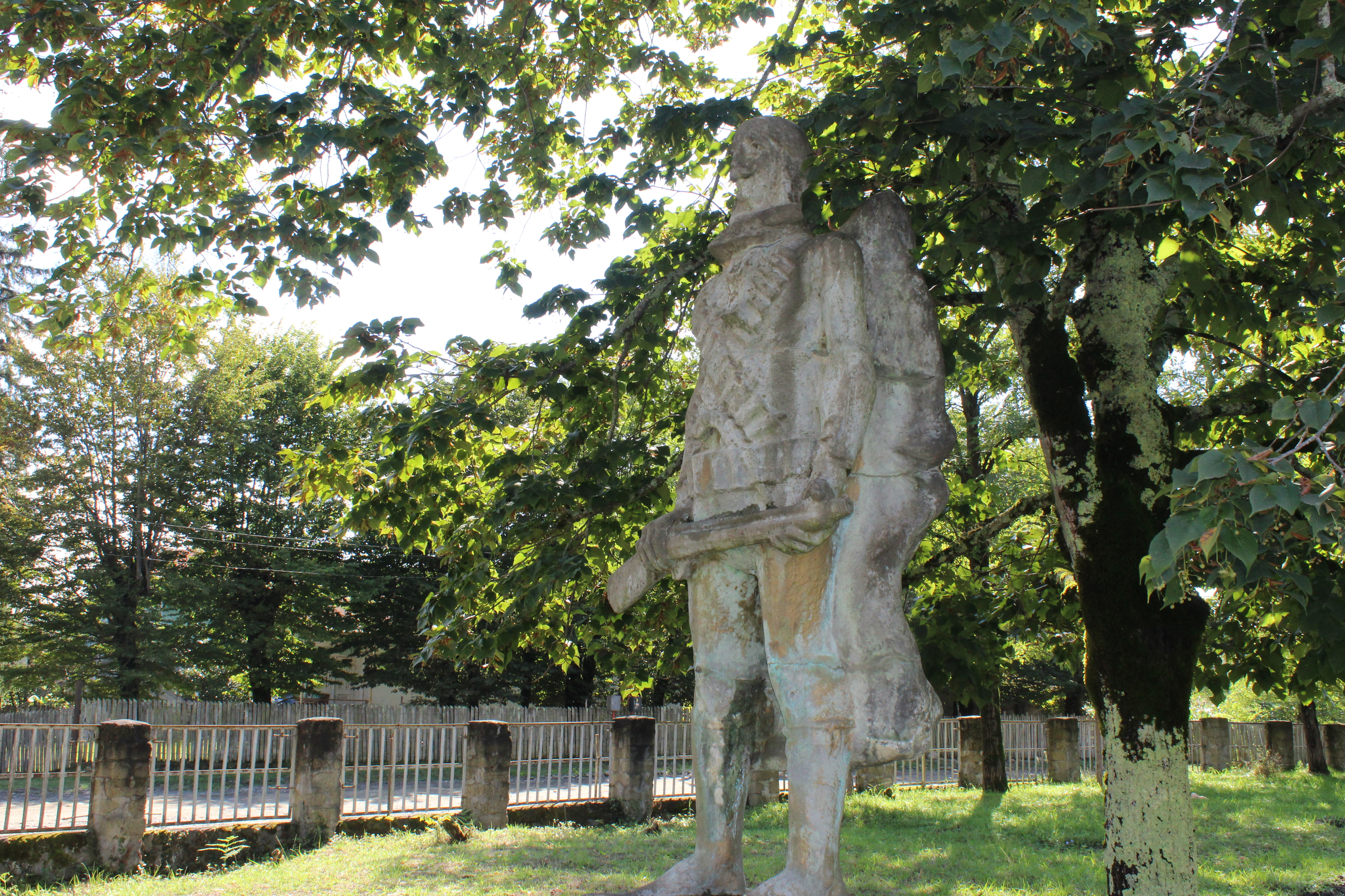 სიმონა დოლიძის ძეგლი შუა ამაღლებაში